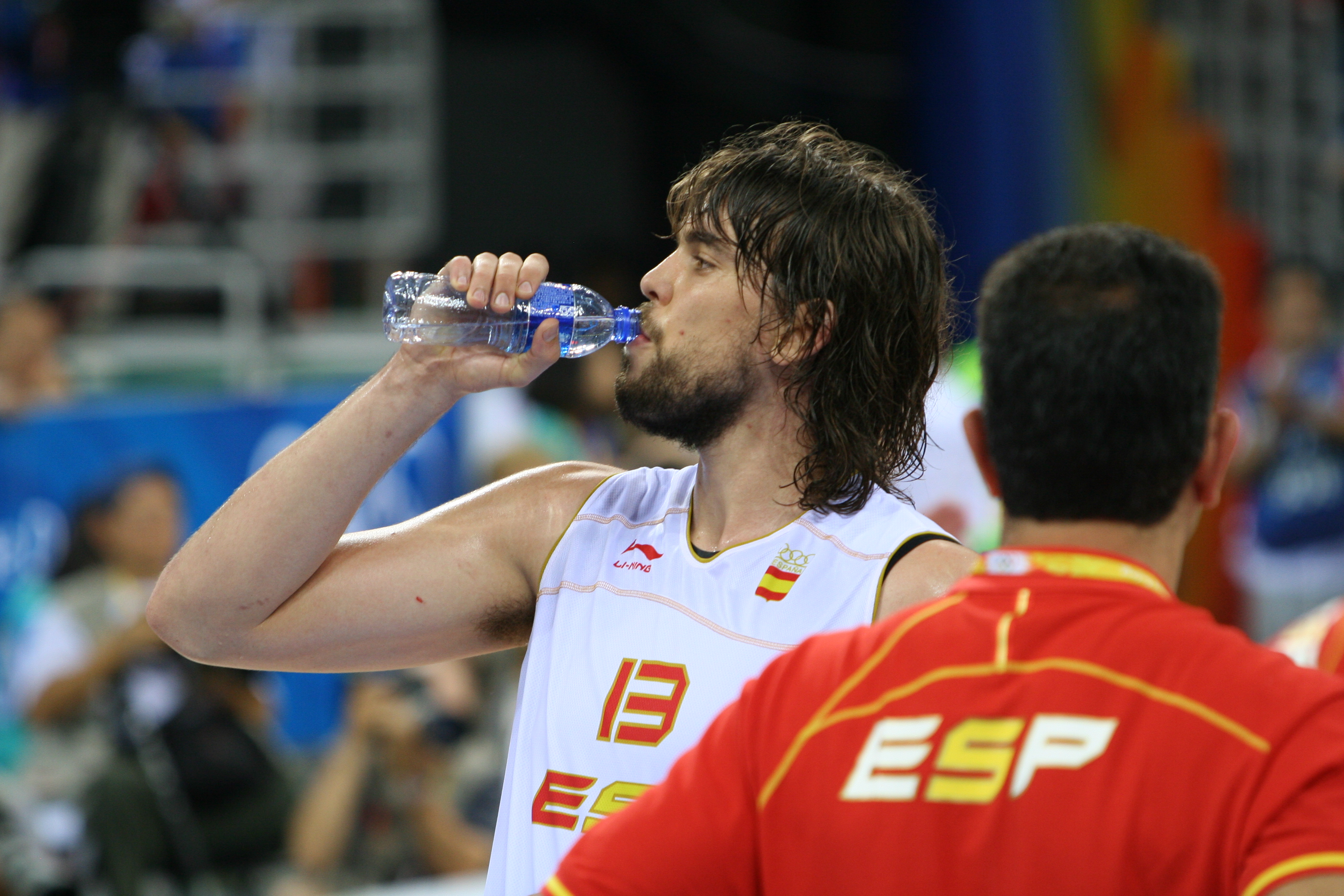 Marc Gasol. Semifinales de los J.J.O.O. Beijing 2008.